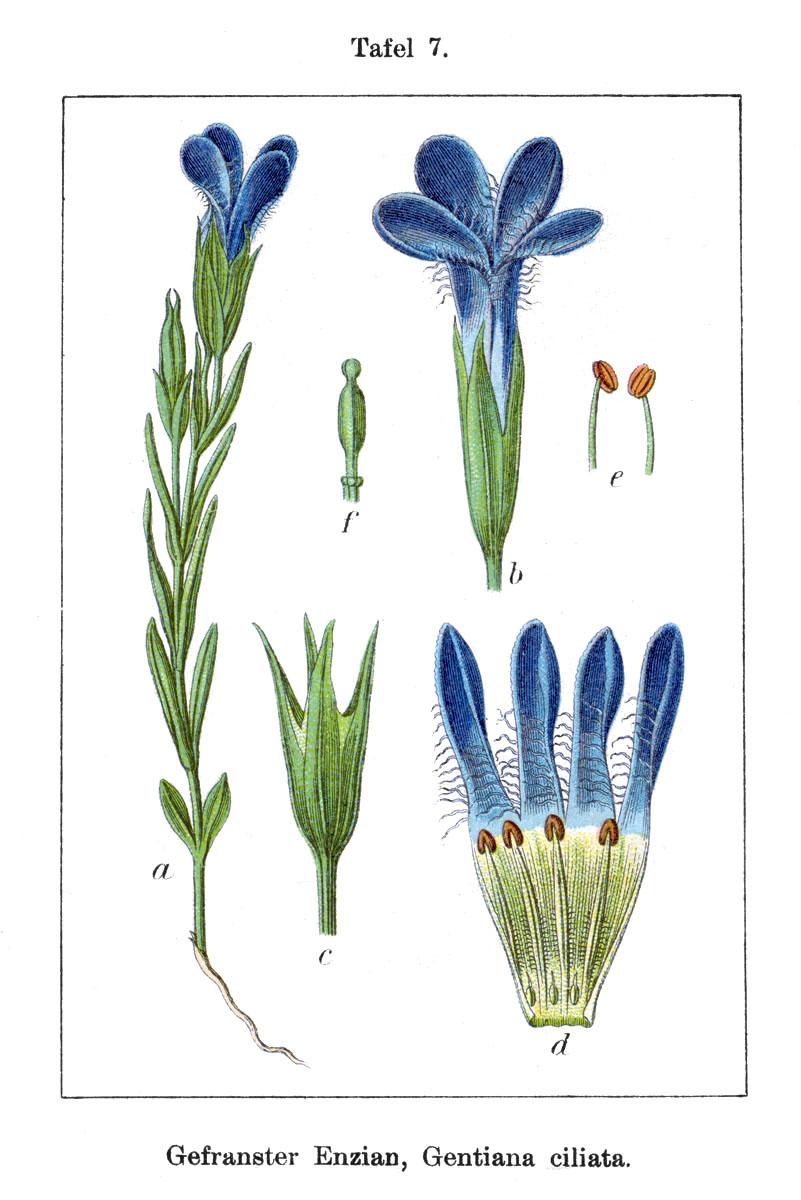 Gentianella ciliata (L.) Borkh., syn. Gentianopsis ciliata (L.) Ma, Gentiana ciliata L. Original Caption Gefranster Enzian, Gentiana ciliata